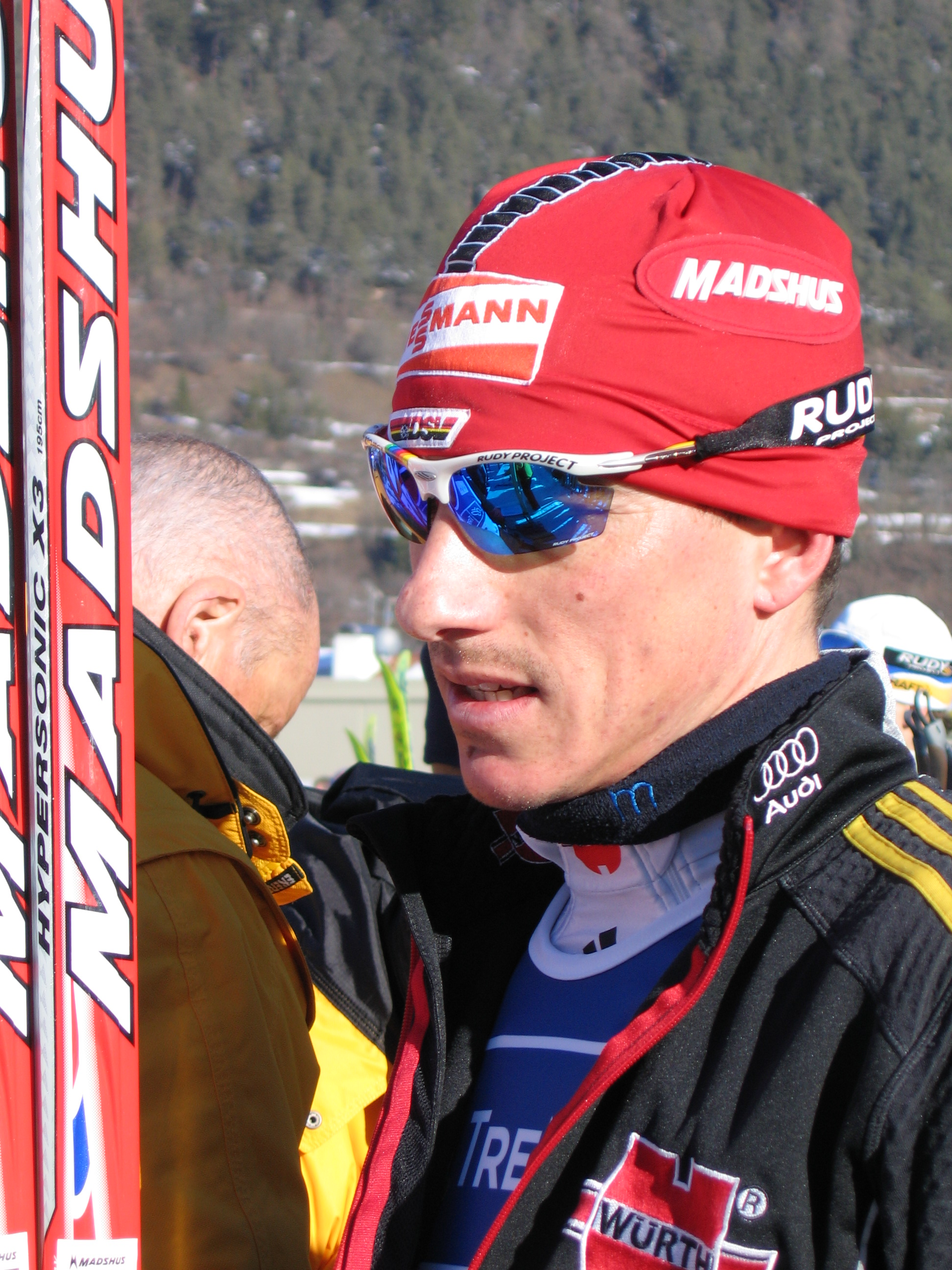 German skier Rene Sommerfeld.